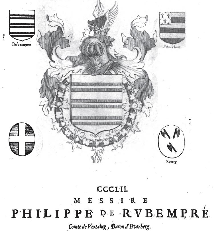 Philippe de Rubempré - blasons